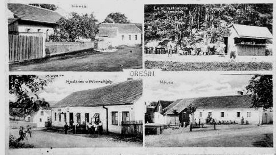 Ořešín, Brno - pohlednice z doby před první světovou válkou